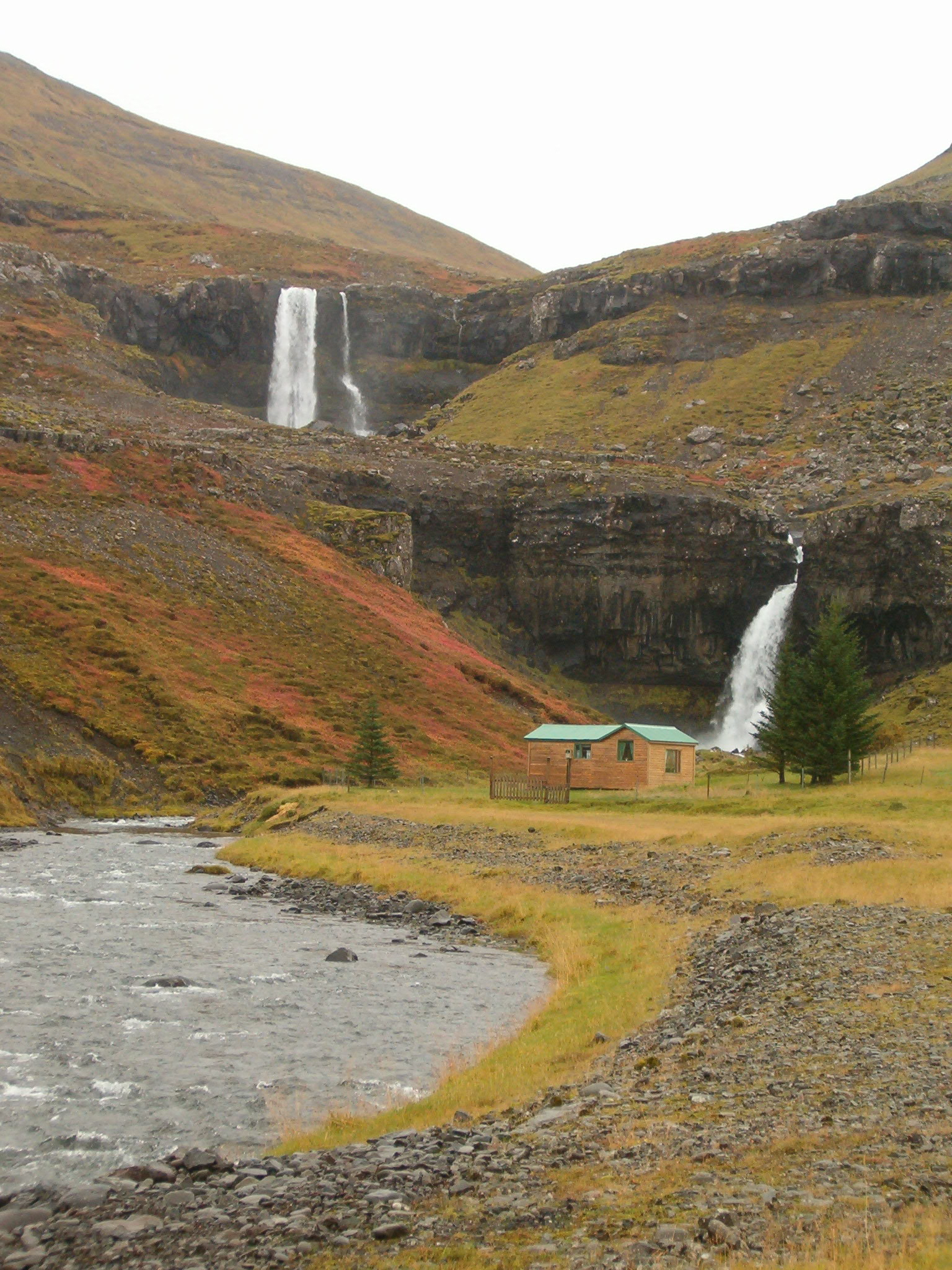 Brynjudalur, valley, Iceland